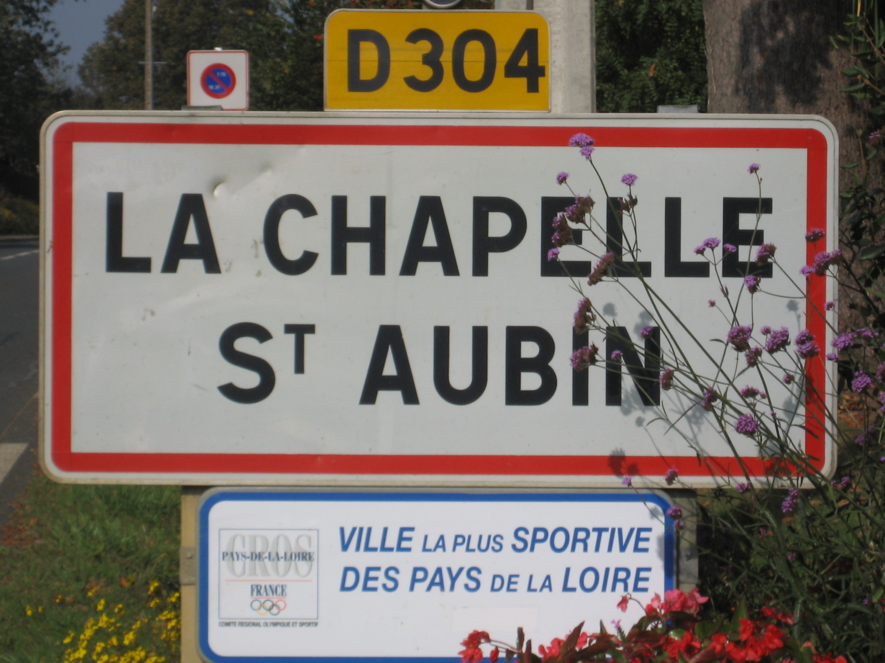 Panneau de la Chapelle Saint Aubin